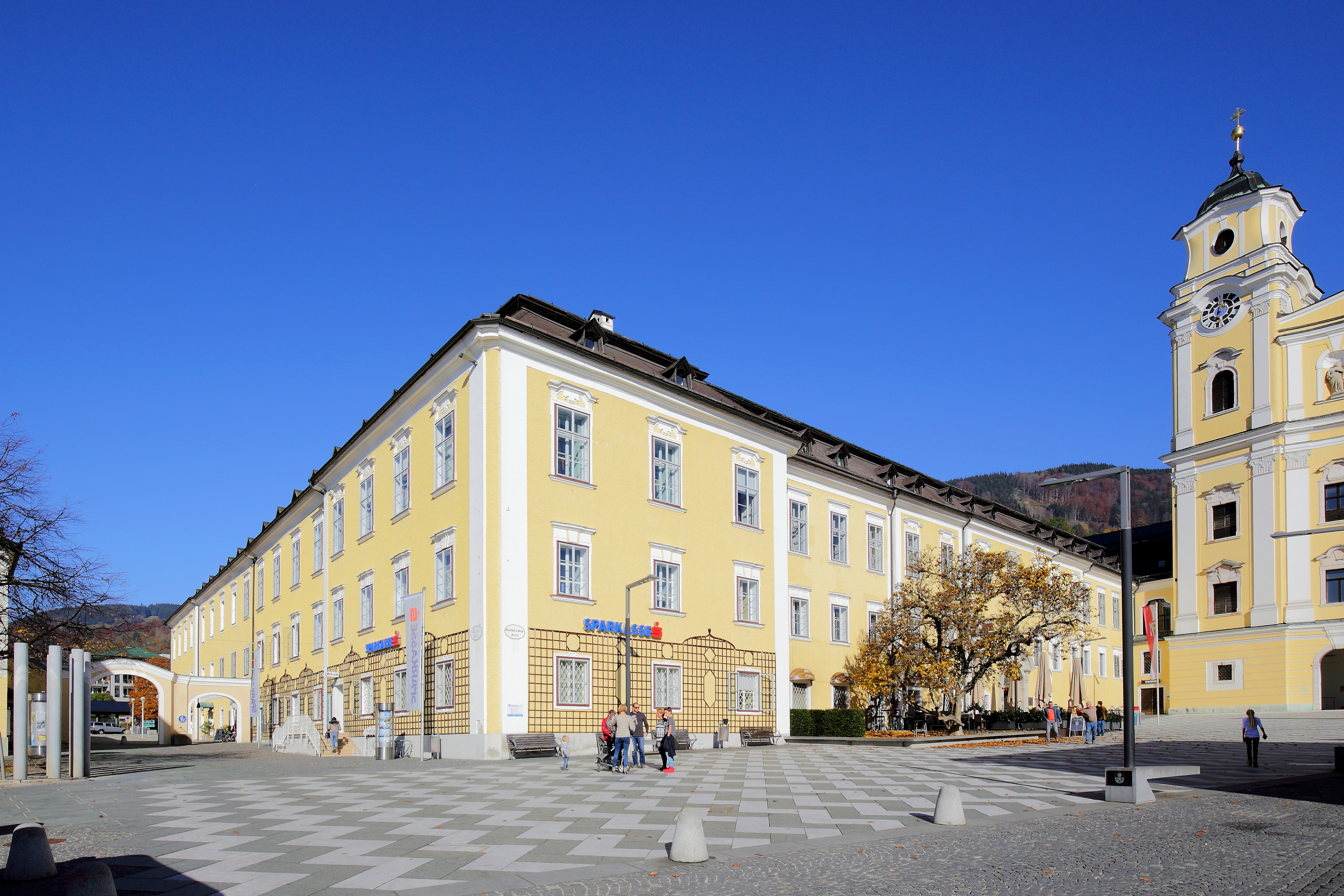 Südwestansicht des ehemaligen Benediktinerklosters, auch als Schloss Mondsee bezeichnet, in der oberösterreichischen Marktgemeinde Mondsee.Das Kloster wurde 748 vom Bayernherzog Odilo gegründet und im Zuge der Josephinischen Kirchenreform im Jahr 1791 aufgelöst. Im Jahr 1809 übergab Kaiser Napoleon das Klostergebäude samt Gütern dem bayrischen Feldmarschall Karl Philipp von Wrede, der es zu einem Schloss um- bzw. ausbaute. Seine Nachkommen verkauften das Schloss im Jahr 1985 oder 1986 an den Unternehmer Asamer. Im Gebäudekomplex sind ein exklusives Schlosshotel, das Heimatmuseum, die Musikschule und das Pfarrzentrum untergebracht. Zahlreiche Räume sind vermietet, unter anderem an die örtliche Sparkasse.